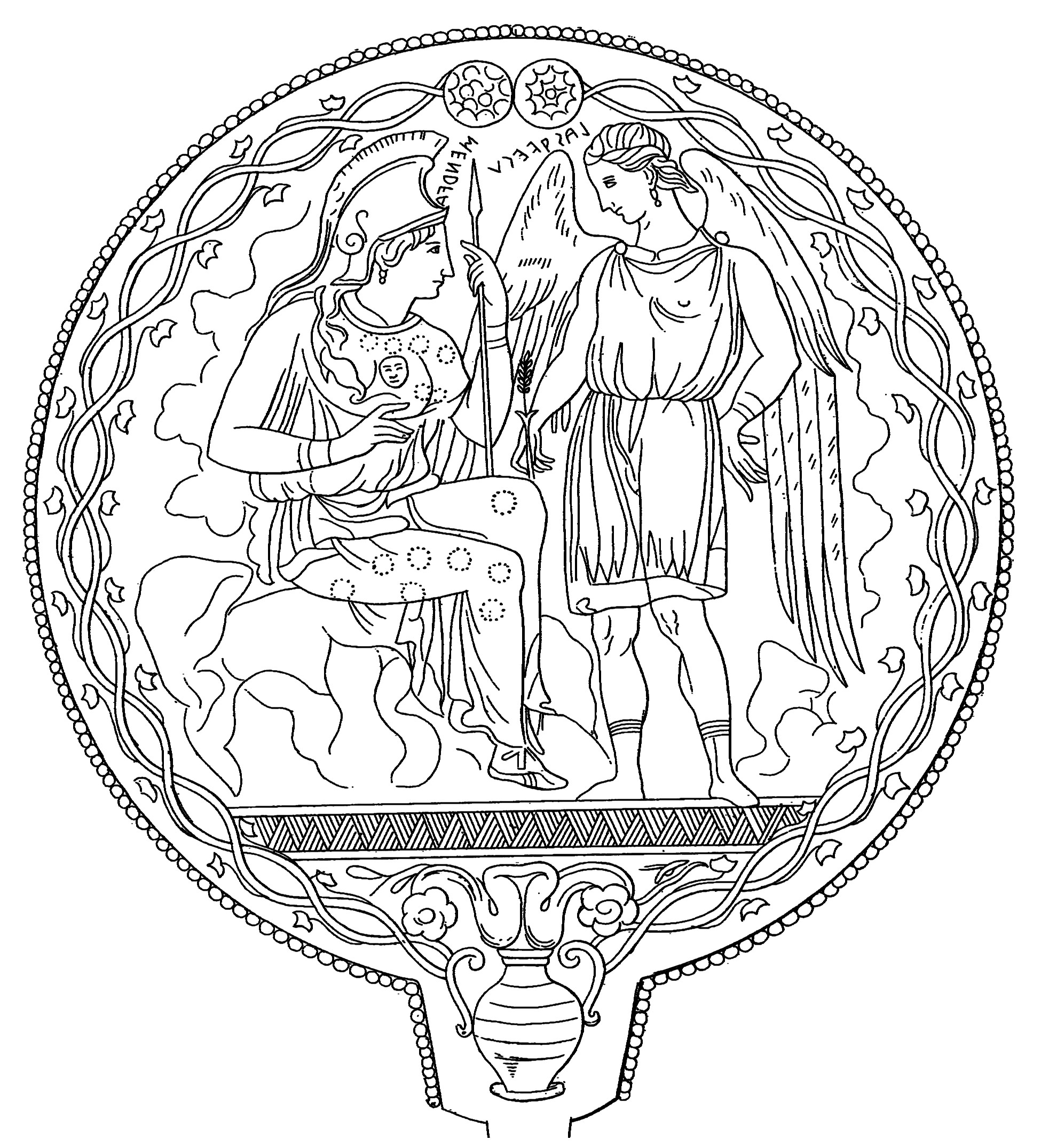 Etruscan bronze mirror with Menrva and Lasa Vecu (Museo Nazionale Etrusco di Villa Giulia, Rome)